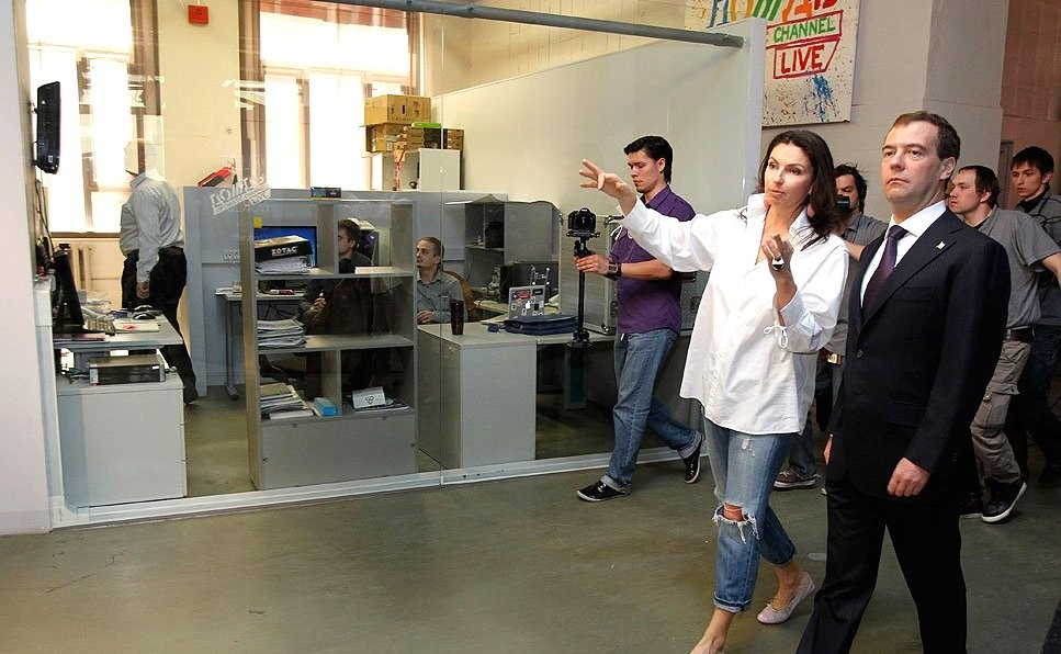 Посещение студии телеканала «Дождь»